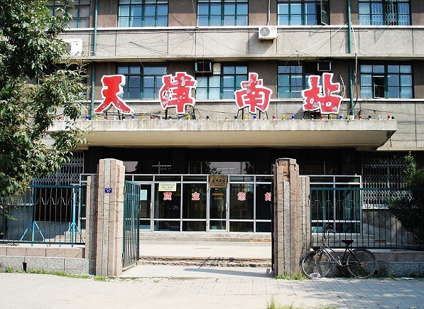 中文（中国大陆）: 旧天津南站大门